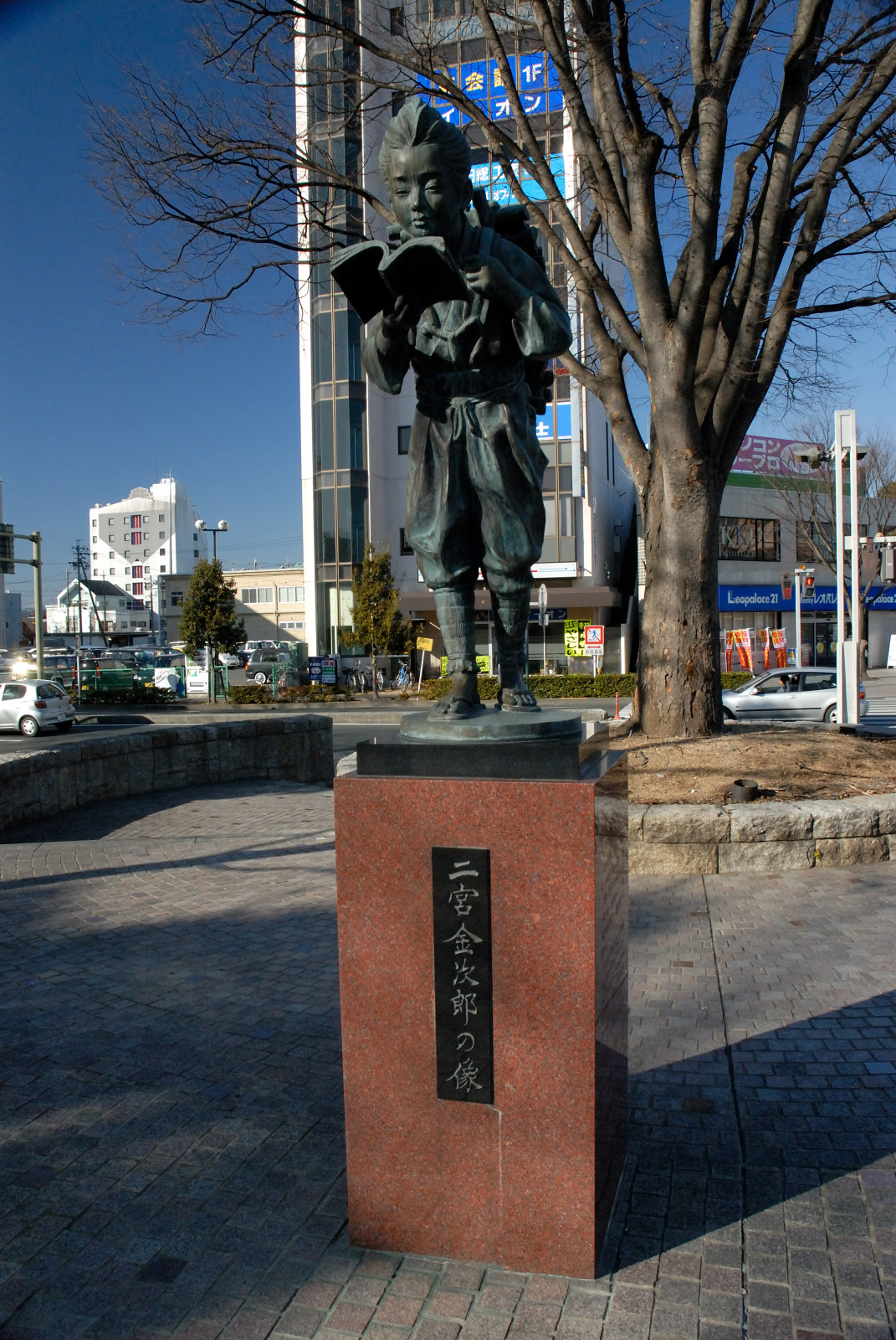 NINOMIYA Kinjiro's statue, Kakegawa, Shizuoka Japan.